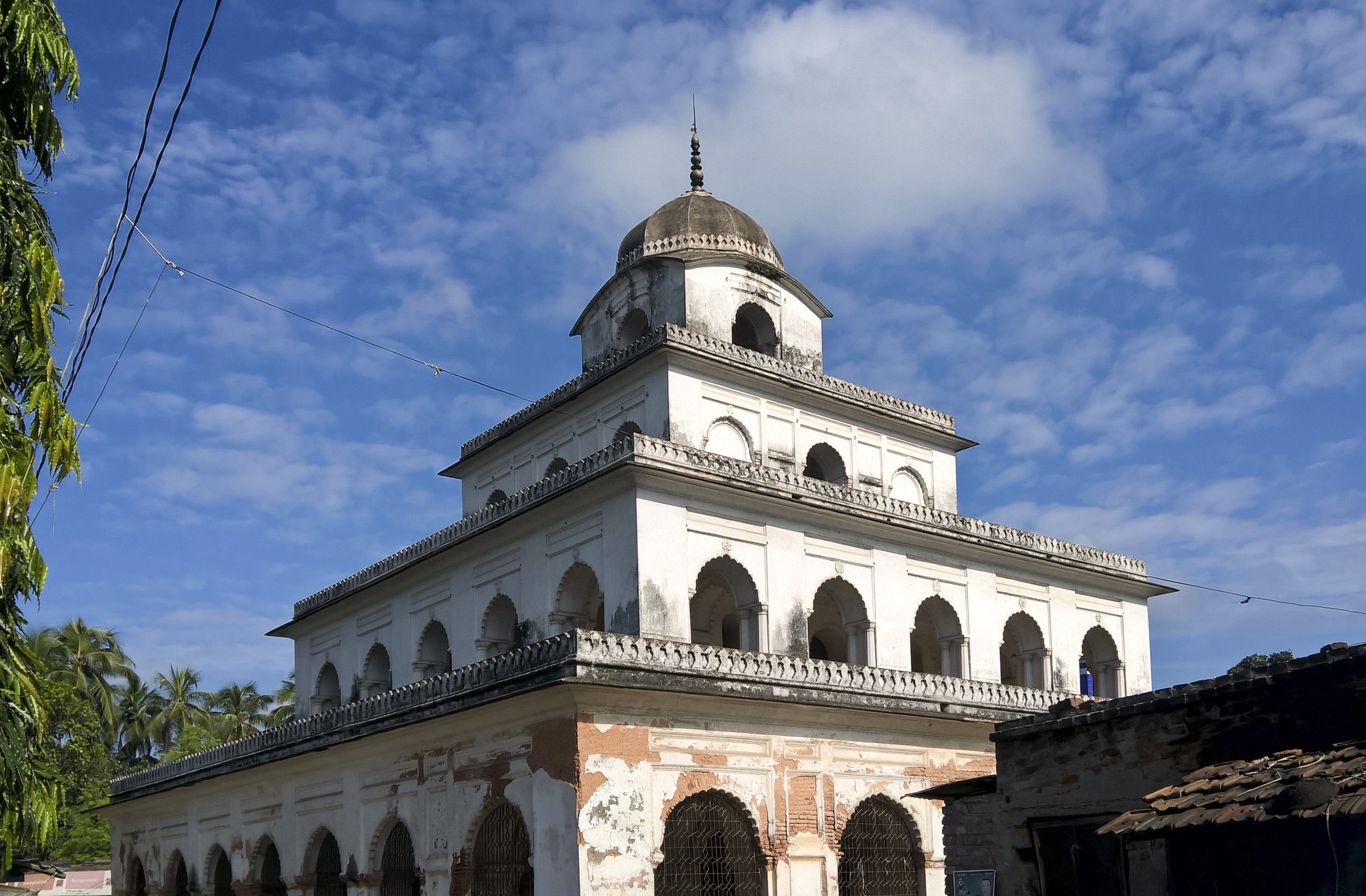 দোল মন্দির পুঠিয়া বাজারের মধ্যে অবস্থিত বর্গাকারে নির্মিত চারতলা বিশিষ্ট একটি সুদৃশ্য ইমারত। মন্দিরের চতুর্থ তলার উপরে আছে গম্ভুজাকৃতির ছাদ। পুঠিয়ার পাঁচআনি জমিদার ভুবেন্দ্রনারায়ণ রায় ১৭৭৮ খ্রিস্টাব্দে মন্দিরটি নির্মাণ করেন।